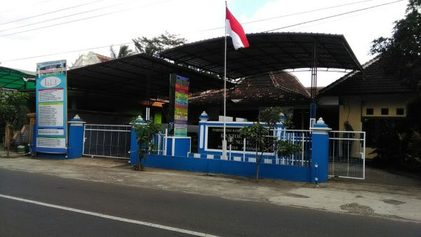 Kantor Desa Curungrejo, Kepanjen, Malang